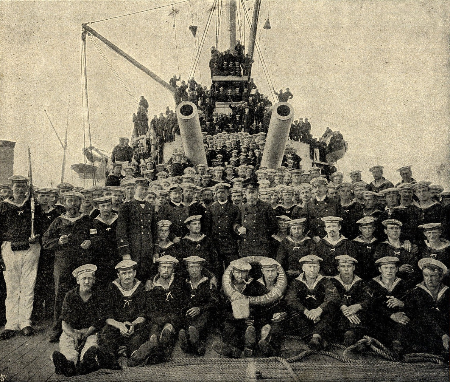 Offiziere und Mannschaften auf Deck der 'Kurfürst Friedrich Wilhelm', 1900